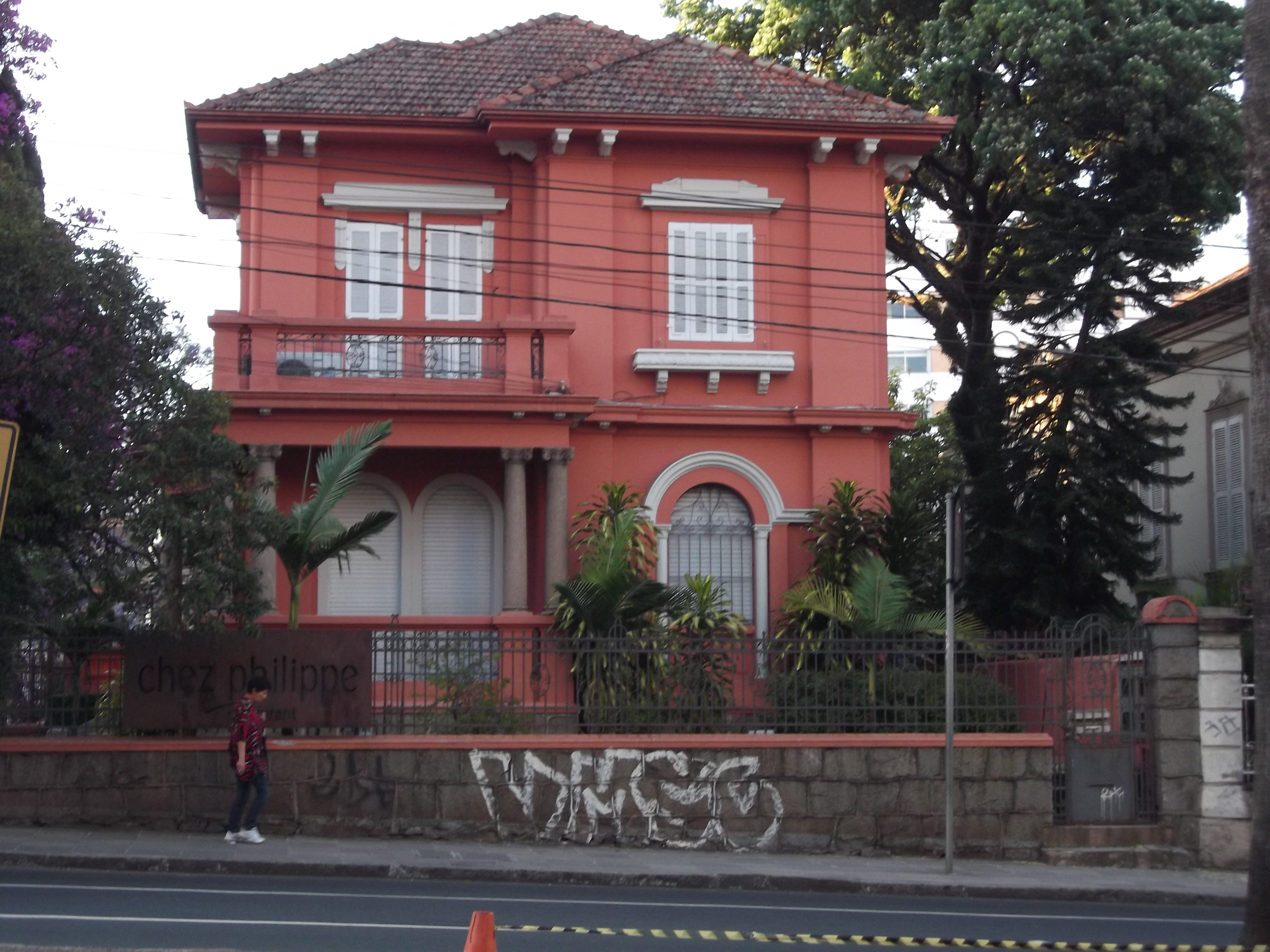 Avenida Independencia, 1005 - Porto Alegre, Brasil = Restaurante Chez Philipe